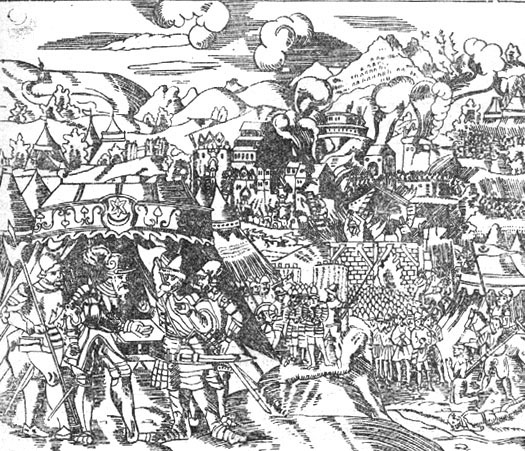 Взятие Полоцка войсками Стефана Батория Гавиньи